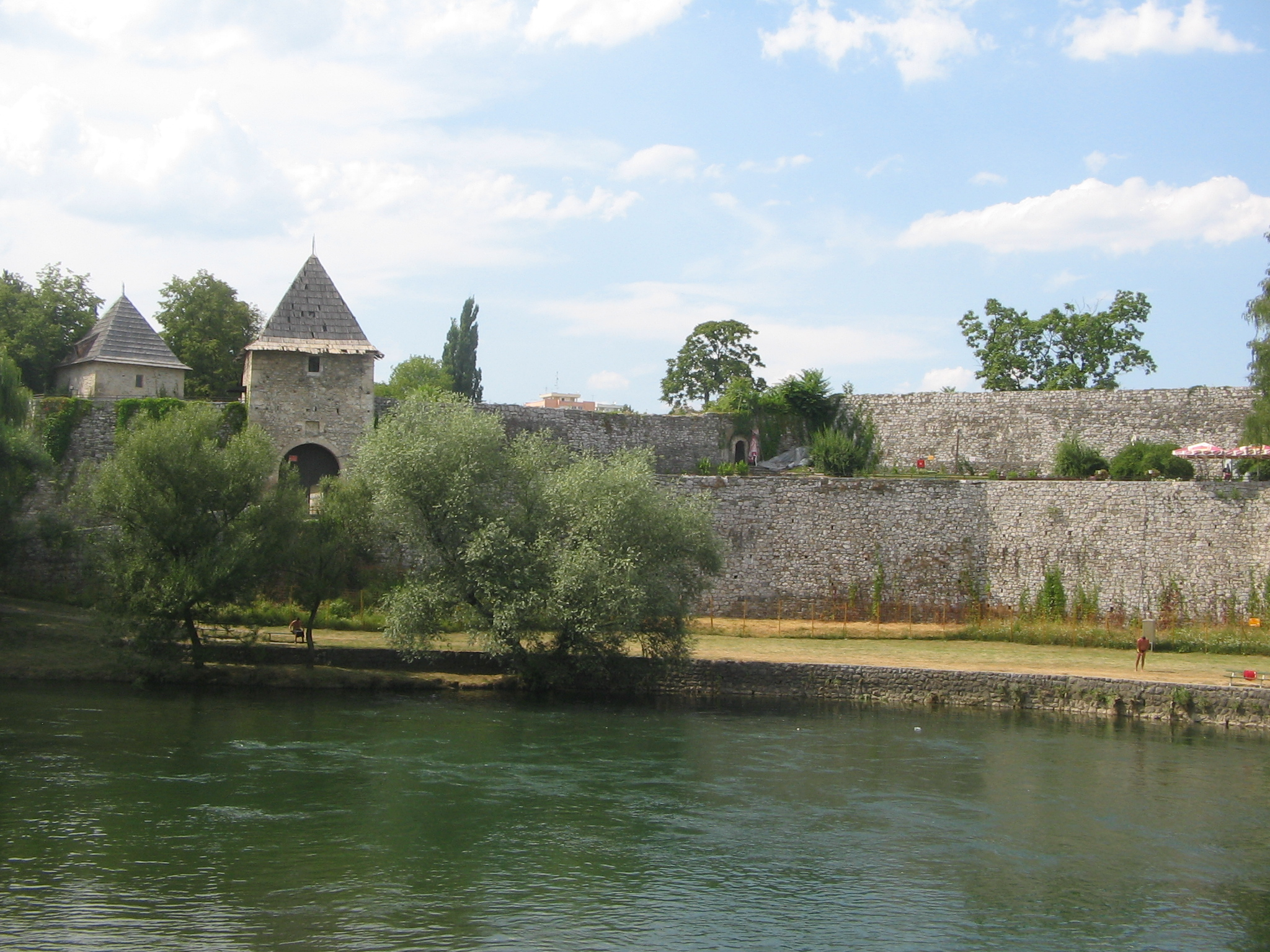 Тврђава Кастел